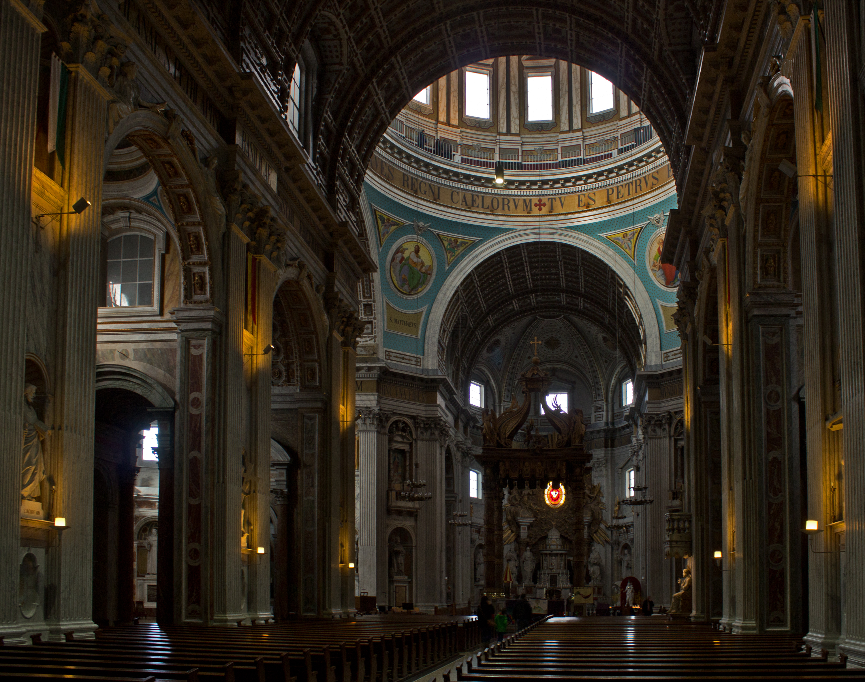 Oudenbosch: Basiliek van de H.H. Agatha en Barbara